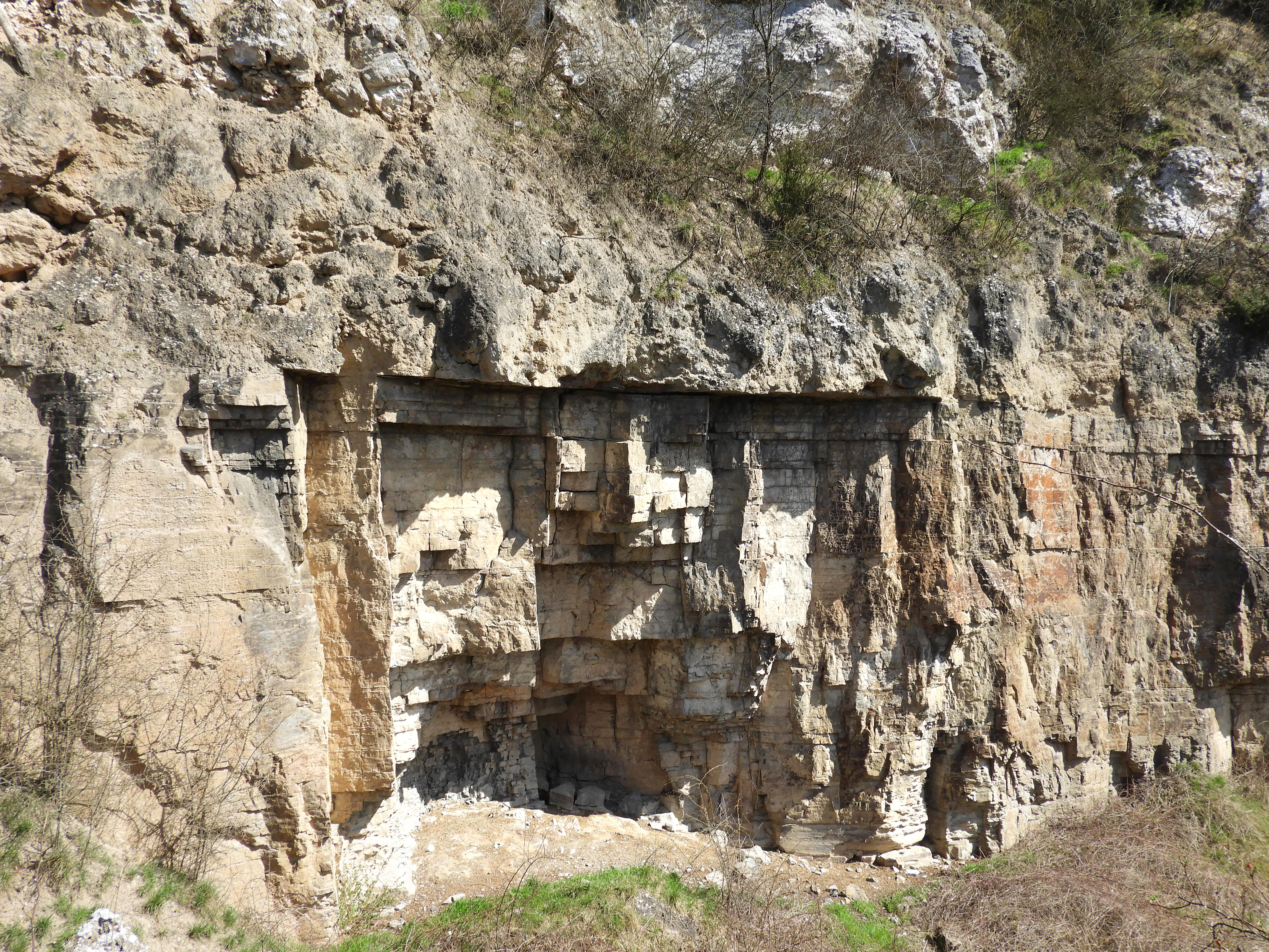 Aufschluss am Westfuß des Jestädter Weinbergs: Unten mauerartig ausgebildeter Zechsteinkalk und darüber Älterer Gips. Der „Jestädter Weinberg“ ist ein Zechsteinrücken am rechten Werraufer im nordhessischen Werra-Meißner-Kreis, dessen sichtbare Dolomitfelsen landschaftsprägend sind. Bereits in 1924 wurden in einer ersten Schutzverordnung sämtliche Felspartien als Naturdenkmale ausgewiesen. Seit 1979 ist der Bereich ein Naturschutzgebiet und seit 2008 als Fauna-Flora-Habitat(FFH)-Gebiet gemeinsam mit dem Naturschutzgebiet „Werraaltarm und Werraaue bei Albungen“ Teil des europäisch vernetzten Schutzgebietssystems Natura 2000.